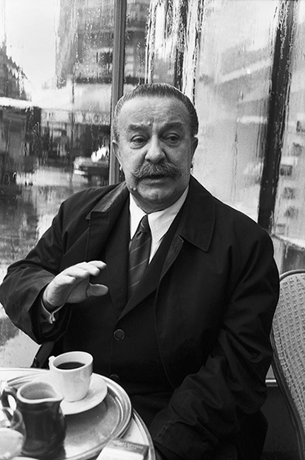 Adolf Hoffmeister v Café les Deux Magots, Paříž, 1969, foto Václav Chochola / © Archiv B&M Chochola